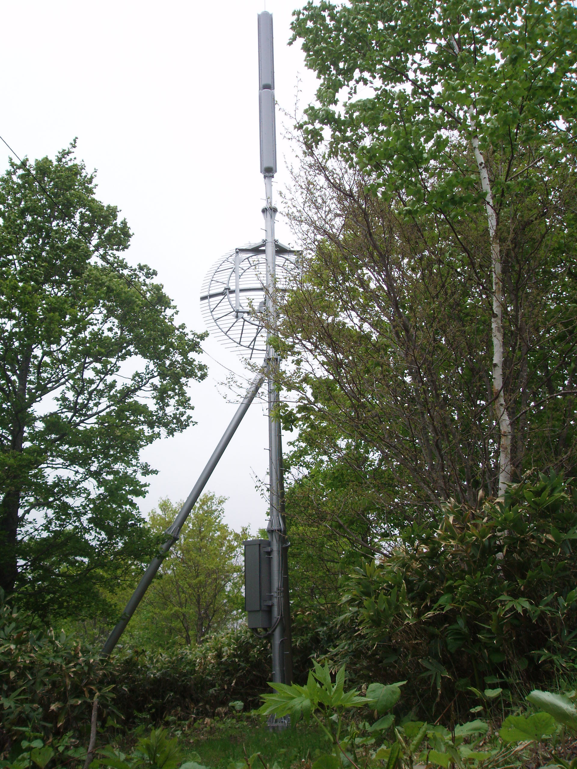 南喜茂別中継局 NHK送信設備